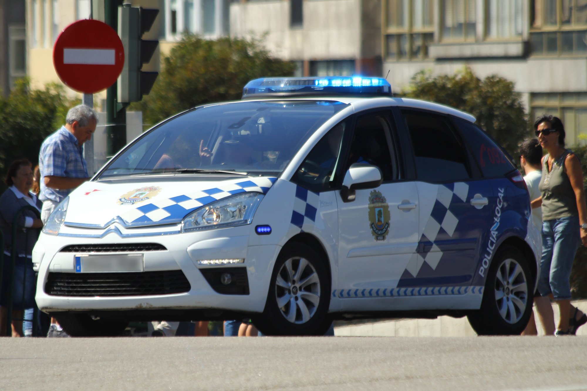 Vuelta a España 2013 a su paso por Vigo-15